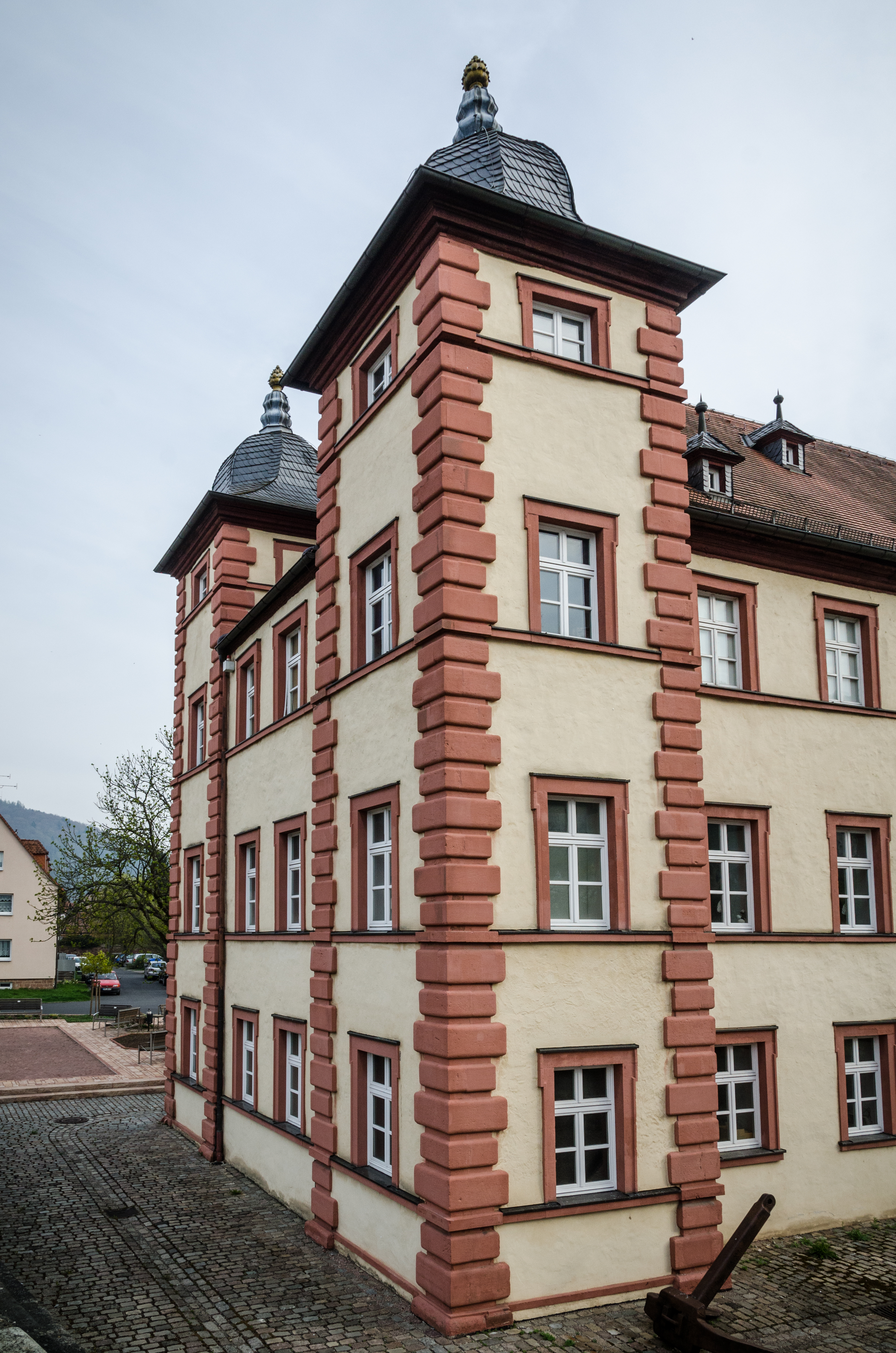 Gemünden, Huttenschloss